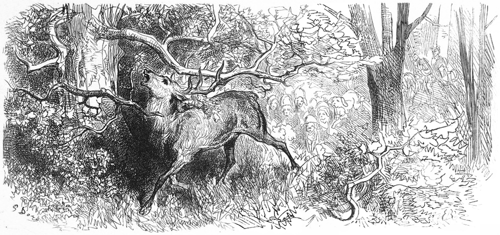 grafika z książki PL Bajki, Jean de La Fontaine, nakładem i drukiem Jana Noskowskiego, Warszawa 1876